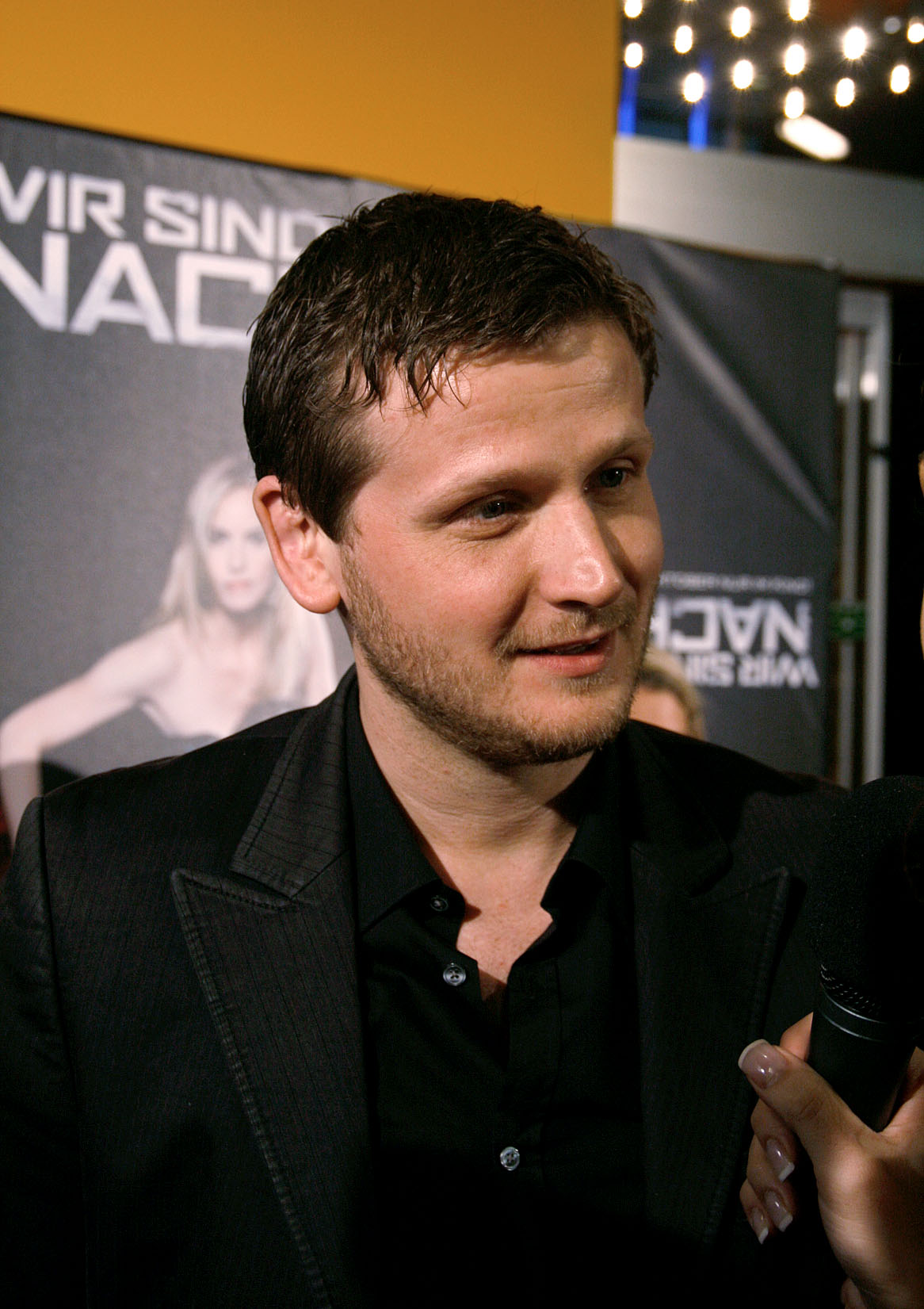 Dennis Gansel bei der Österreichpremiere von Wir sind die Nacht im Apollo Kino in Wien.